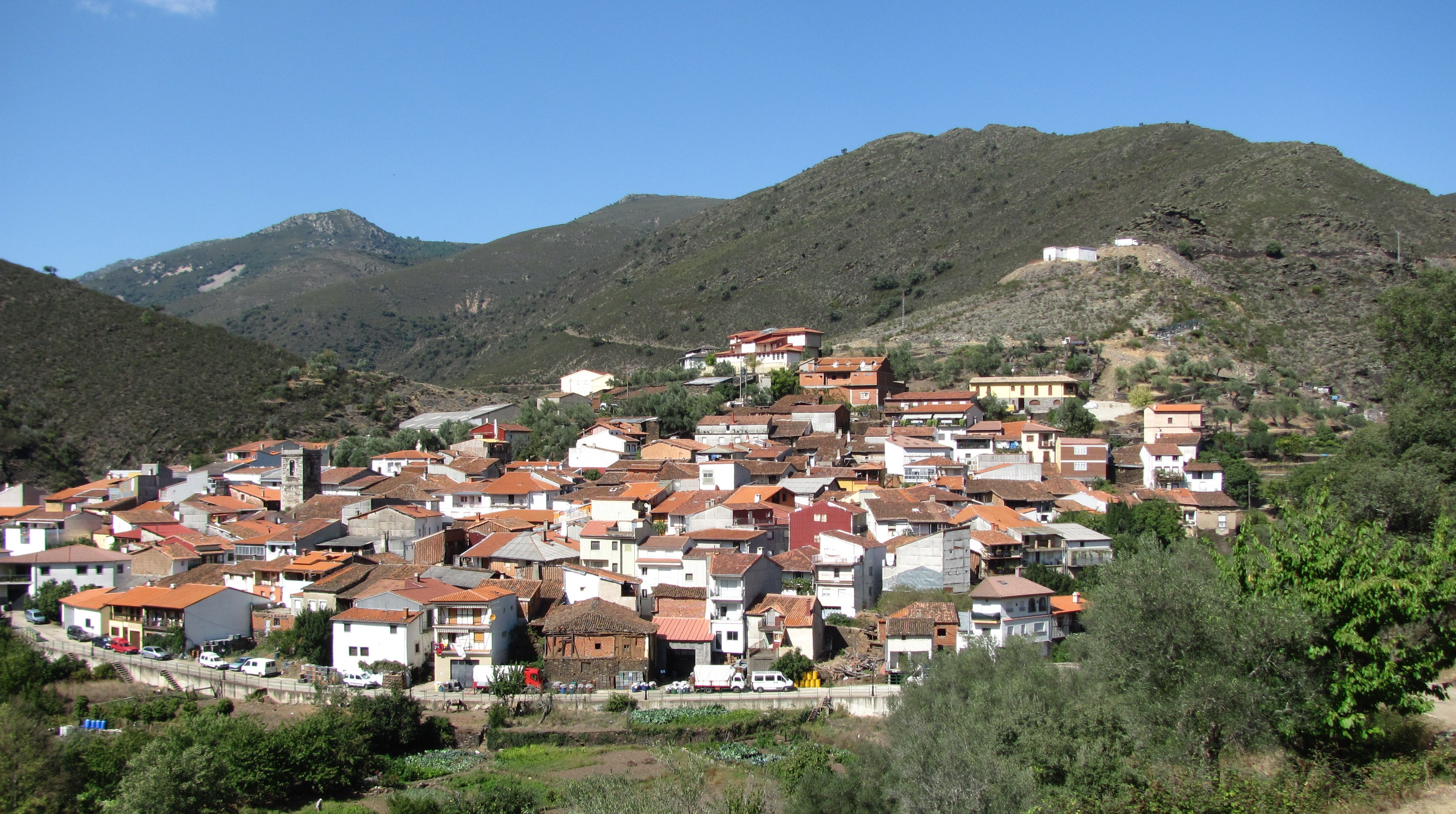 Vista de Valero en la Sierra de Francia, Salamanca, España